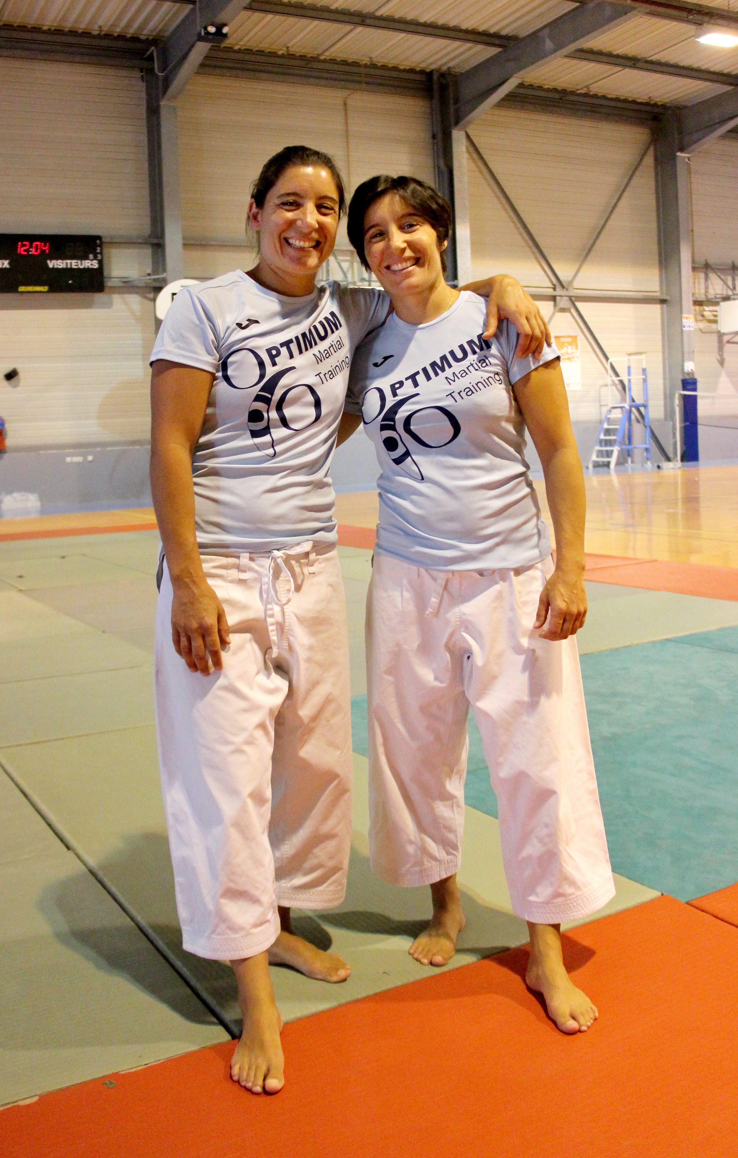 Sabrina Buil (à gauche) et Jessica Buil (à droite) en 2019 à Sète lors d'un stage d'entraînement annuel.